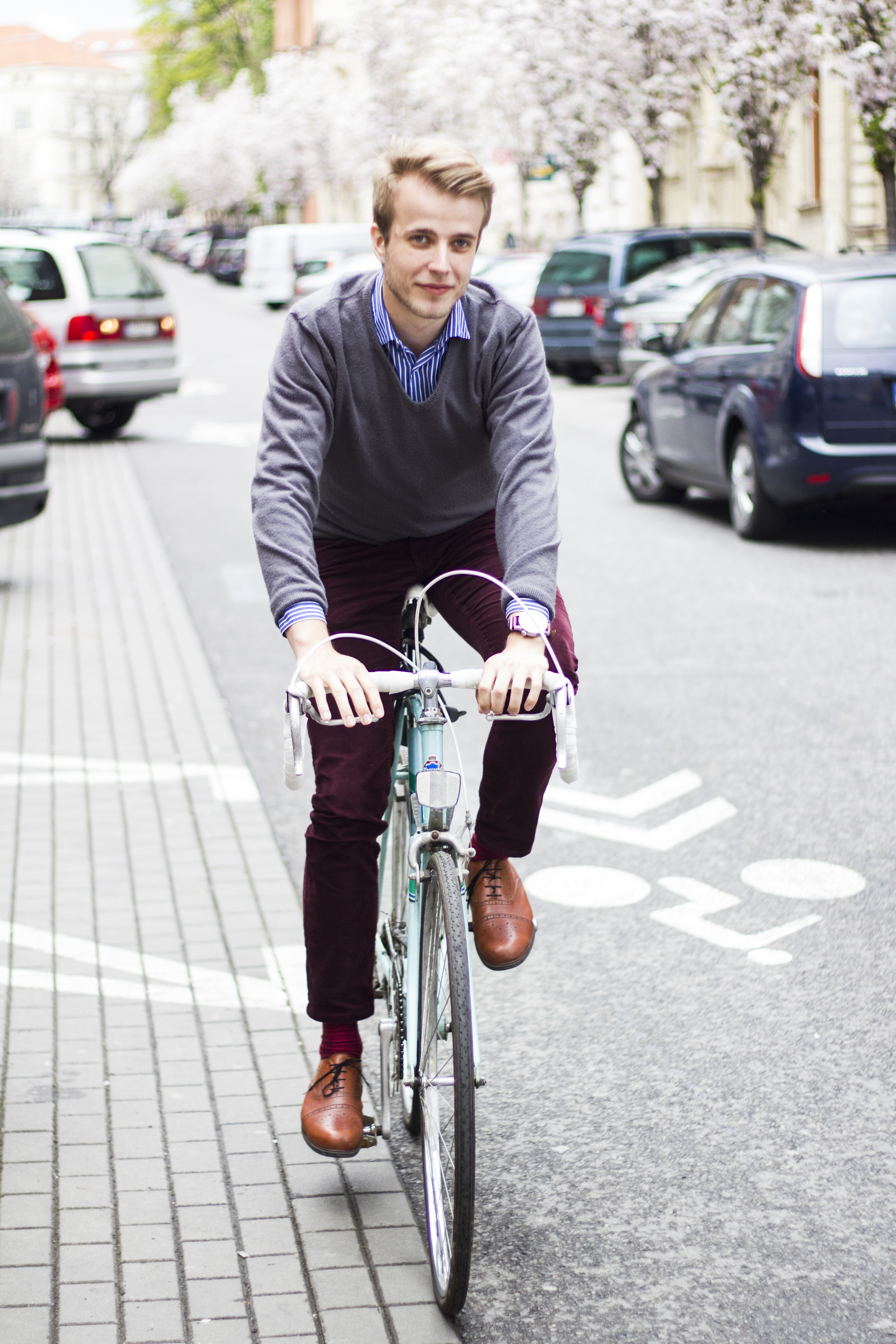 Jaselská, Brno, CZ for: Časopis Halas Ladislav Zibura